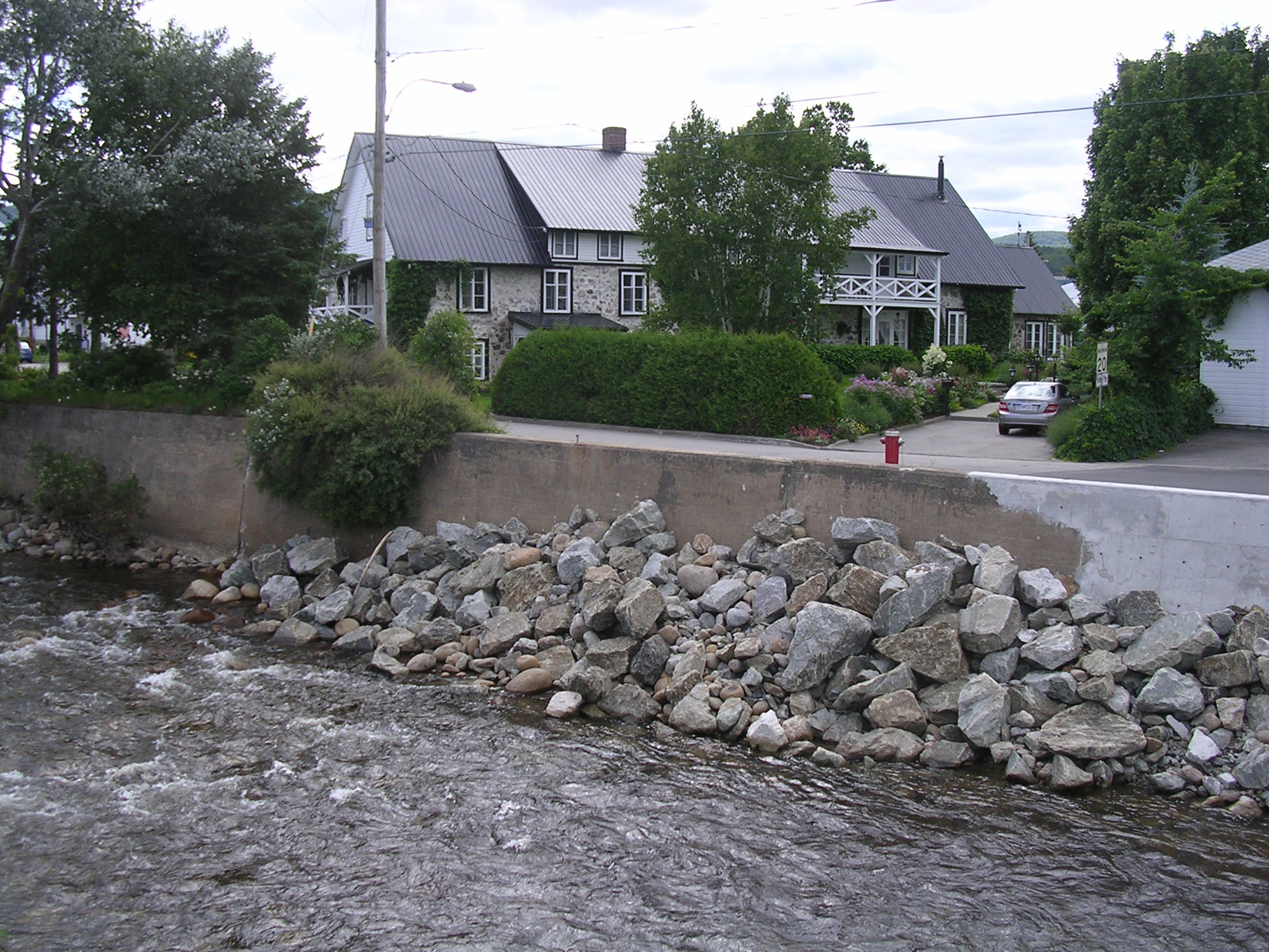 Moulin Gariépy à Baie-Saint-Paul (Québec); moulin à eau; moulin à farine, à bardeaux et à cardes. Construit sur la rivière Bras du Nord ouest, il ne reste rien des mécanismes. Des logements ont été aménagés dans cet ancien moulin.